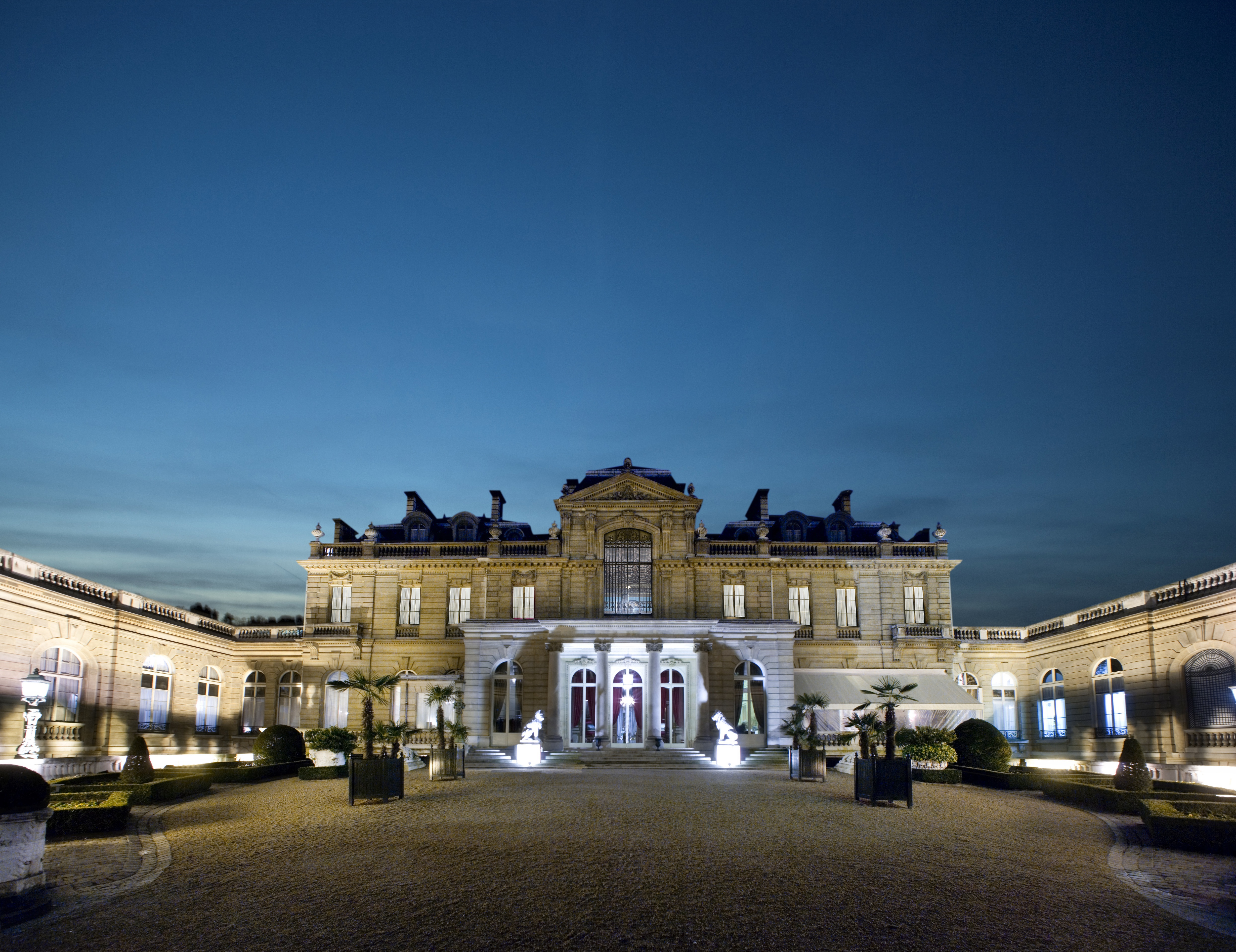 Henri Parent (Français, 1819-1895), hôtel particulier (1869-1875) du collectionneur Edouard André, devenu Musée Jacquemart-André, 158 Boulevard Haussmann, VIIIe arrondissement, Paris, France.